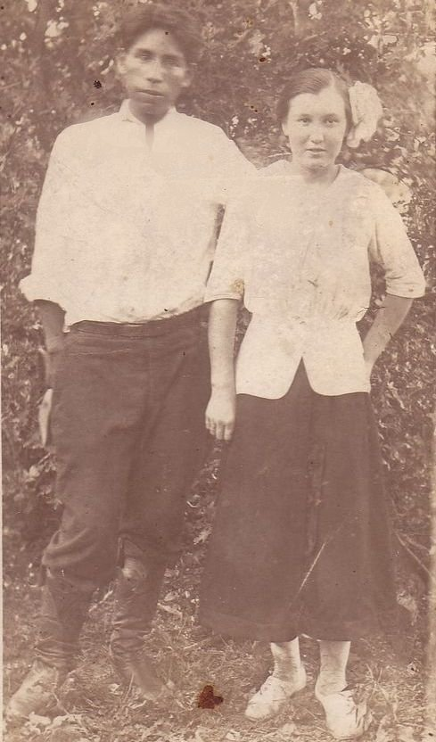 Pareja de huasos chilenos